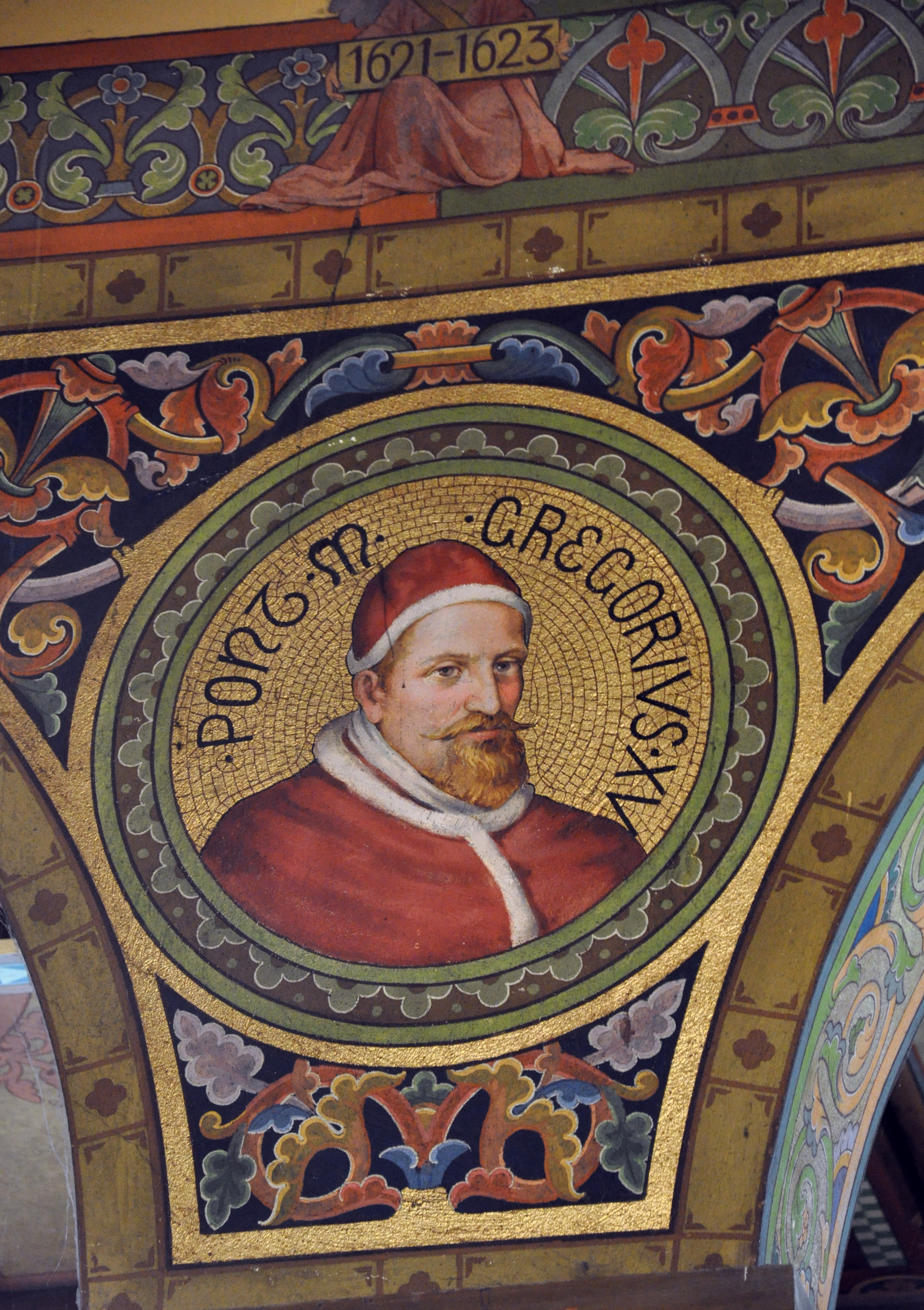 Kloster Mehrerau, Bregenz, Vorarlberg; Collegiumskapelle; Bildnisse von Päpsten (in den Arkadenzwickeln) und zugehörige Wappen; Gregor XV.